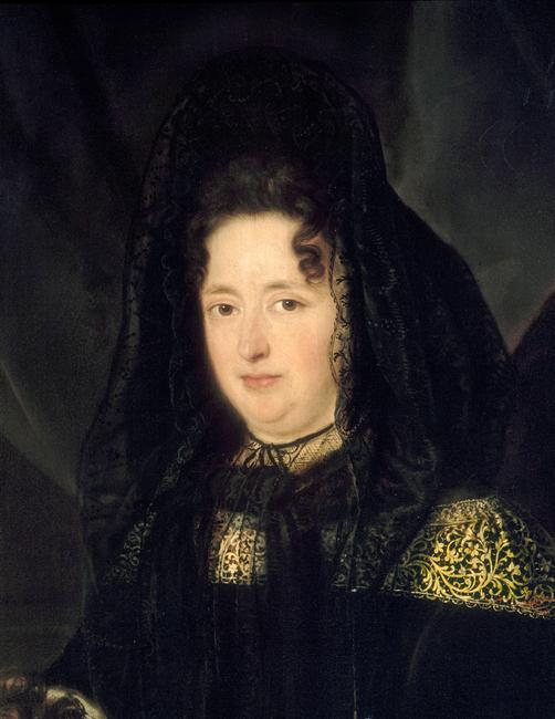 Madame de Maintenon, Ausschnitt aus einem Gemälde von Louis Elle, dem Jüngeren